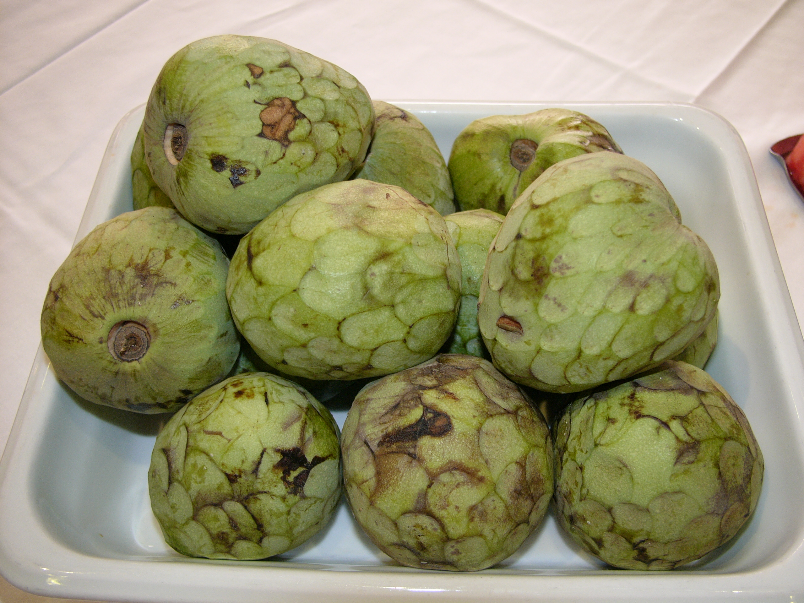 Cherimoya from Andalusia, Spain